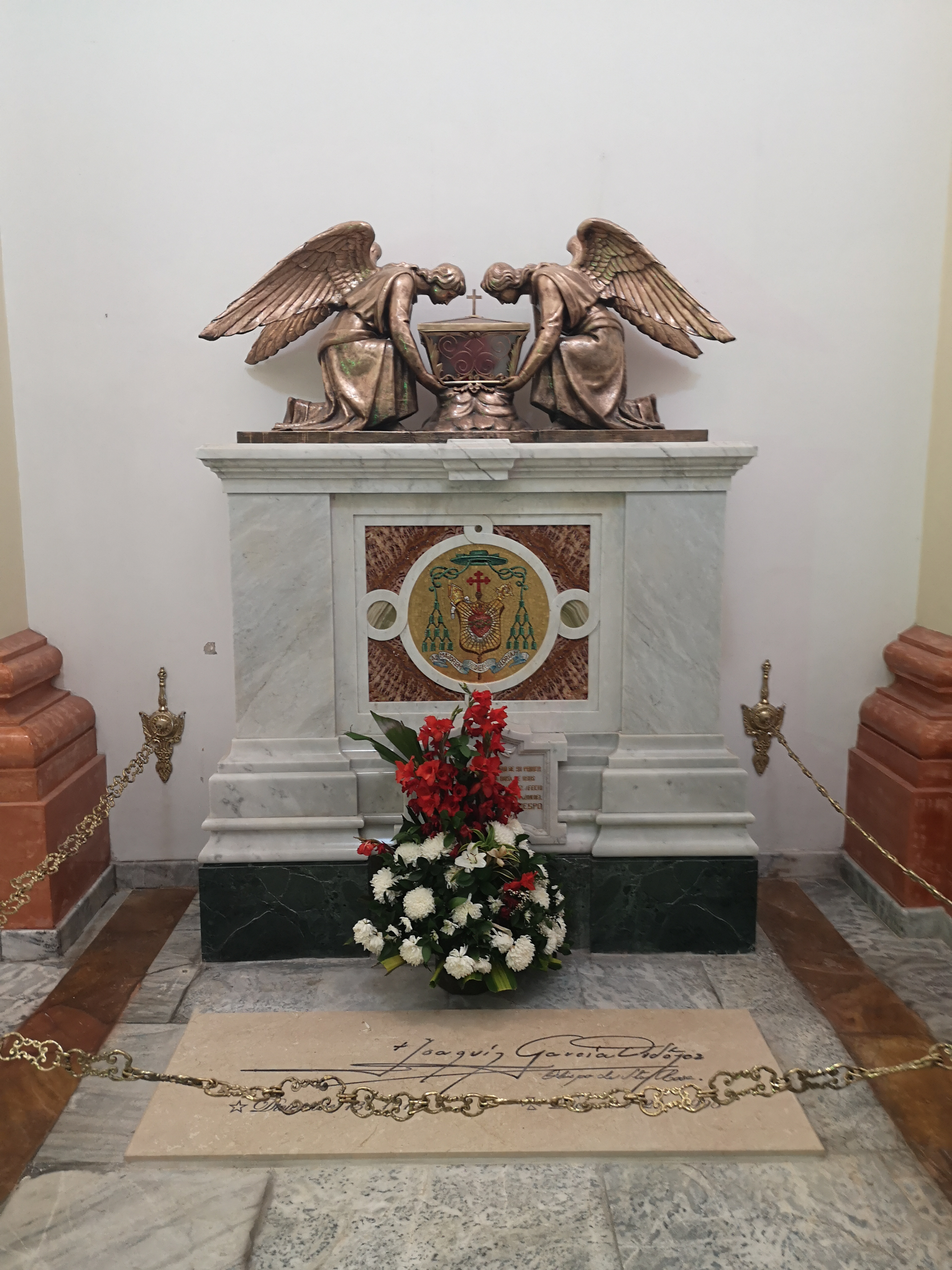 Catedral de Santa Rosa de Osos - Joaquín García Ordóñez